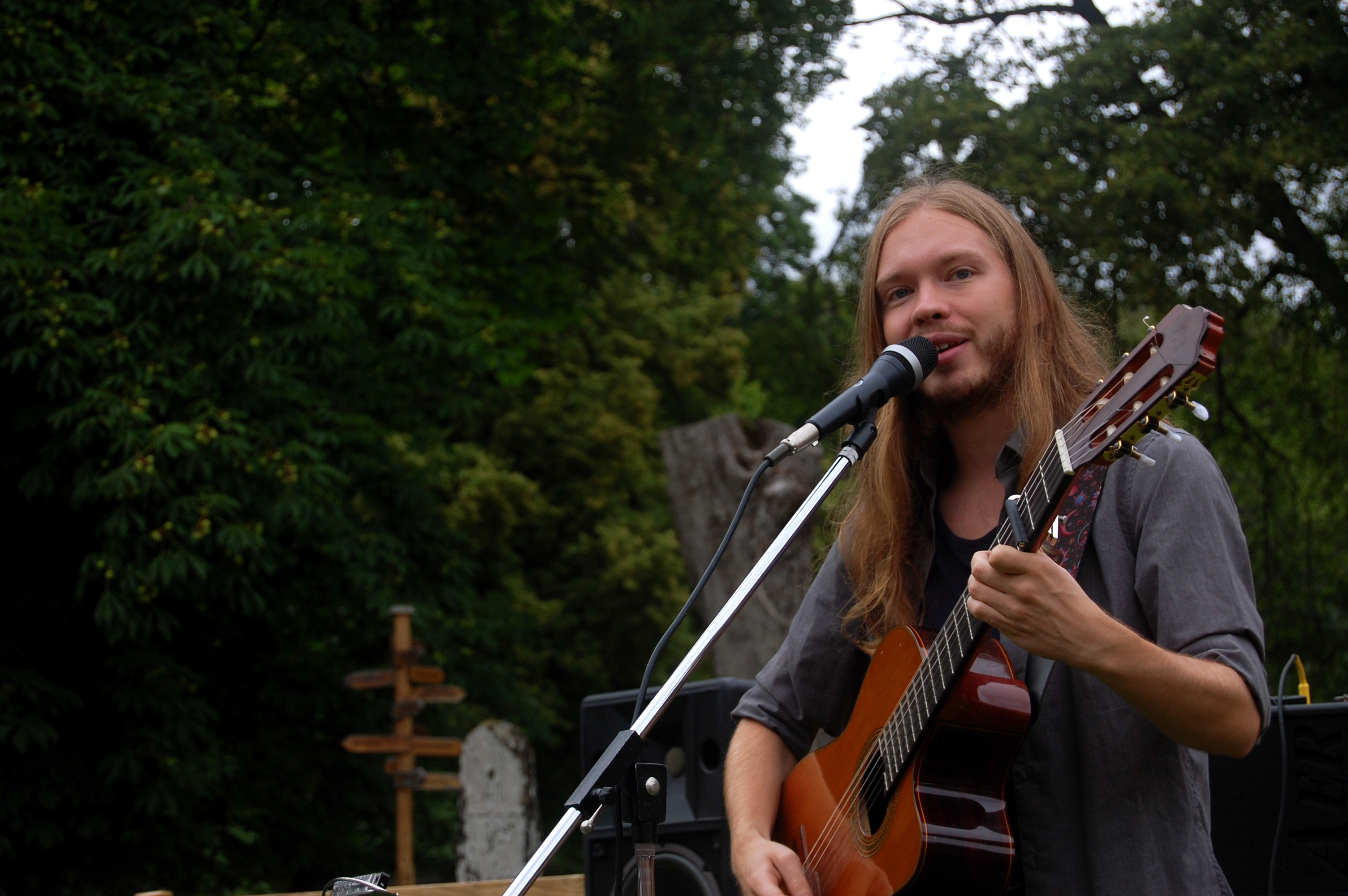 Emanuel Blume spelar på Sundsby Säteri, juli 2010. Foto: Julia Isberg